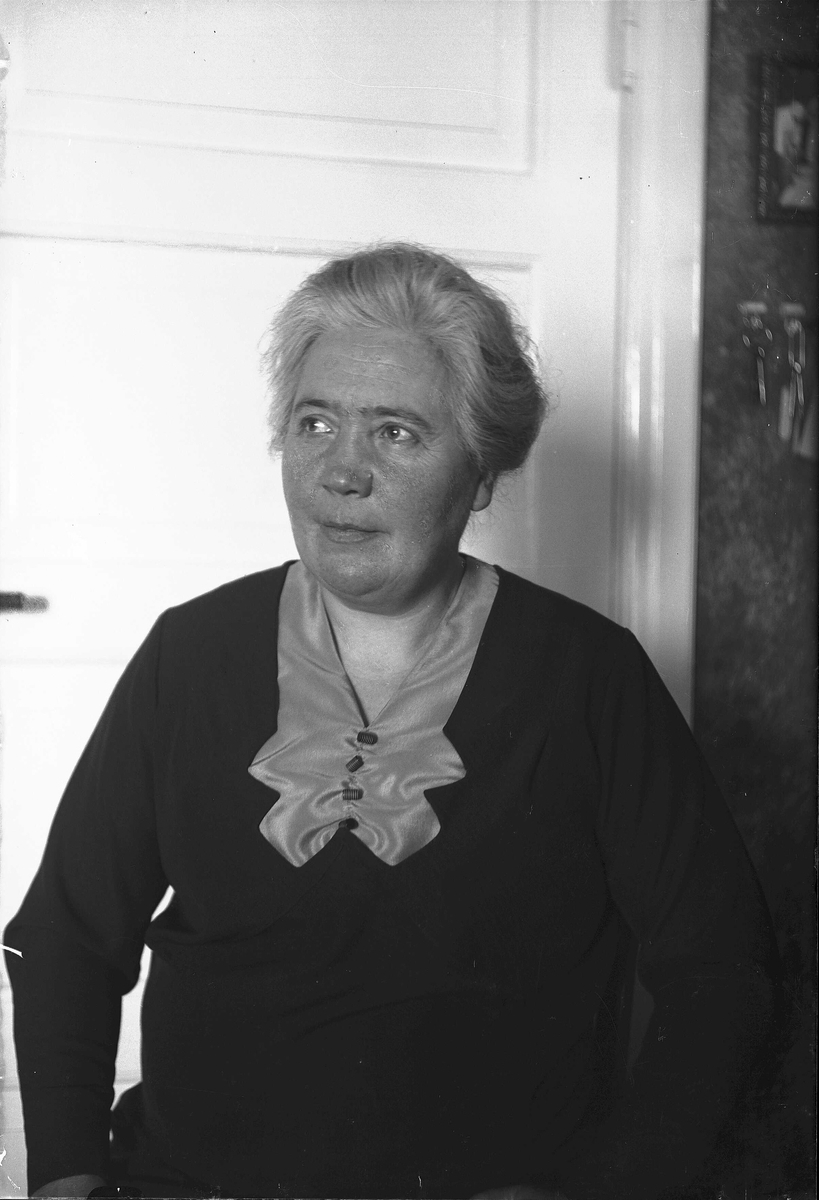 Synnøve Finden (1882-1957) var en norsk forretningskvinne. I 1928 etablerte Synnøve Finden Ostefabrikk.